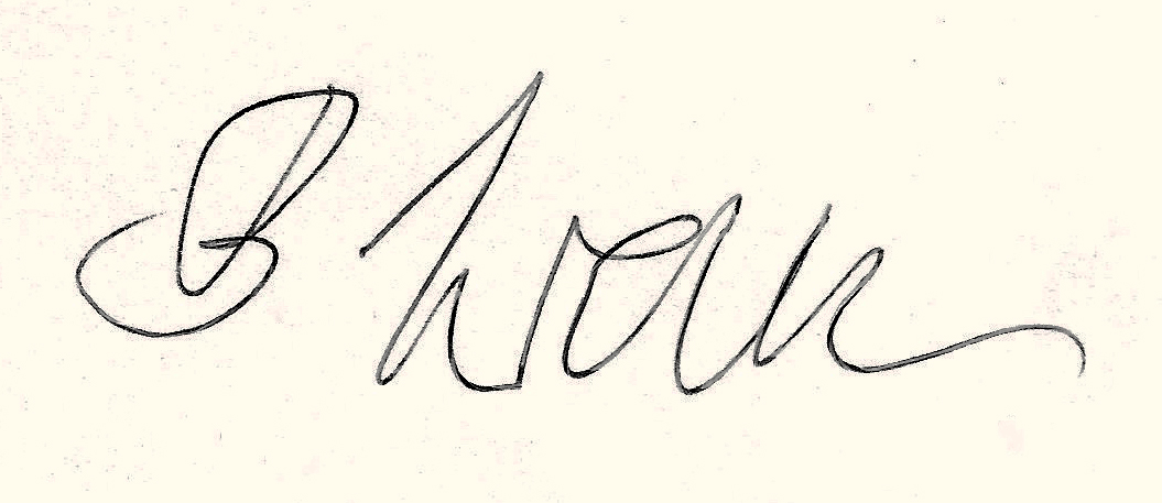 Bernhard Welte. Signatur seines Briefes an mich vom 8.09.1976.